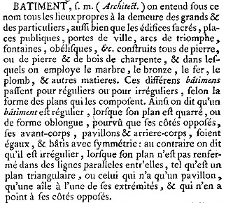 Première édition de l'Encyclopédie de Diderot et d'Alembert, tome 2 (B – Cezimbra).